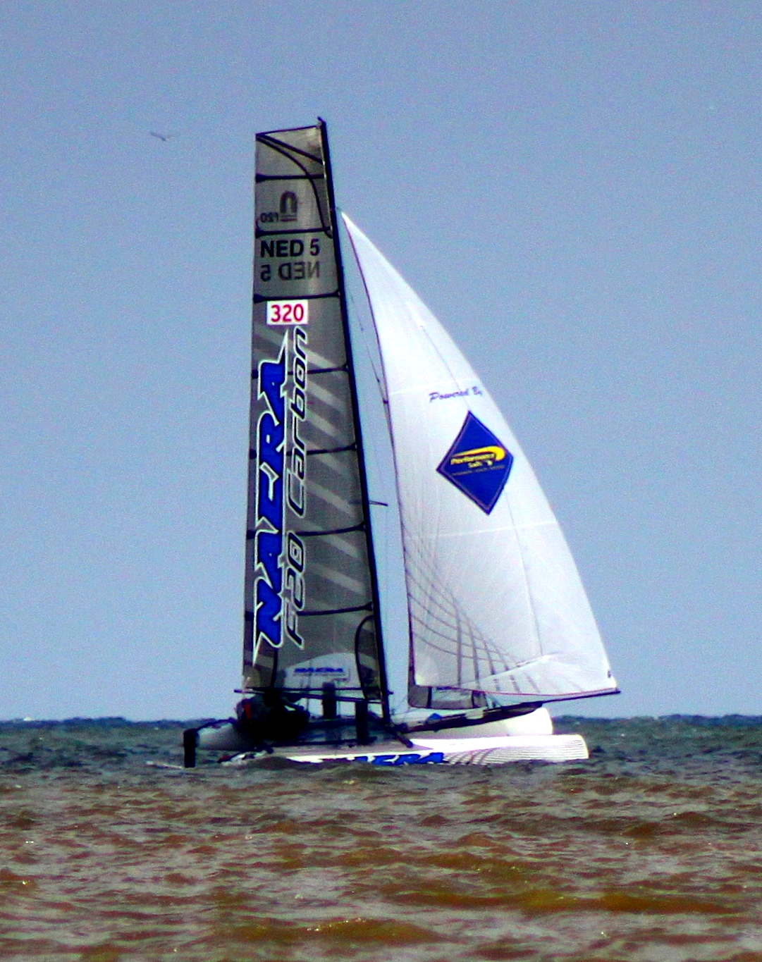 Texel - Ronde van Texel 2014 - Peter Vink samen met Mischa de Munck voer het snelst rond Texel. - Nacra 20 catamaran met aangepaste zwaarden en roeren